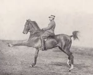 L'écuyer français du Cadre noir Etienne Beudant et son cheval Barbe Mimoun au trot en extension